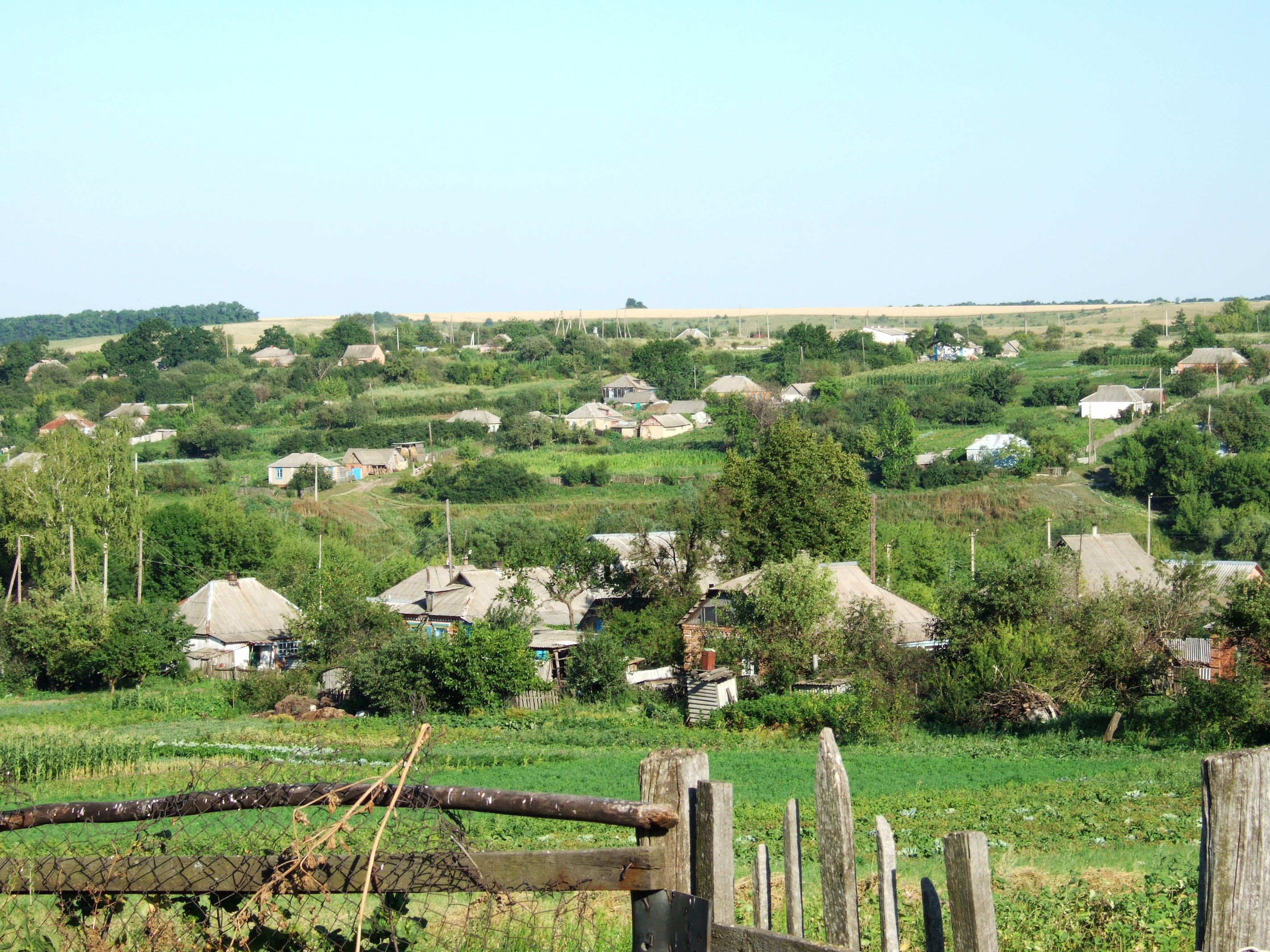 Наиболее узнаваемая панорама села Хатнее.